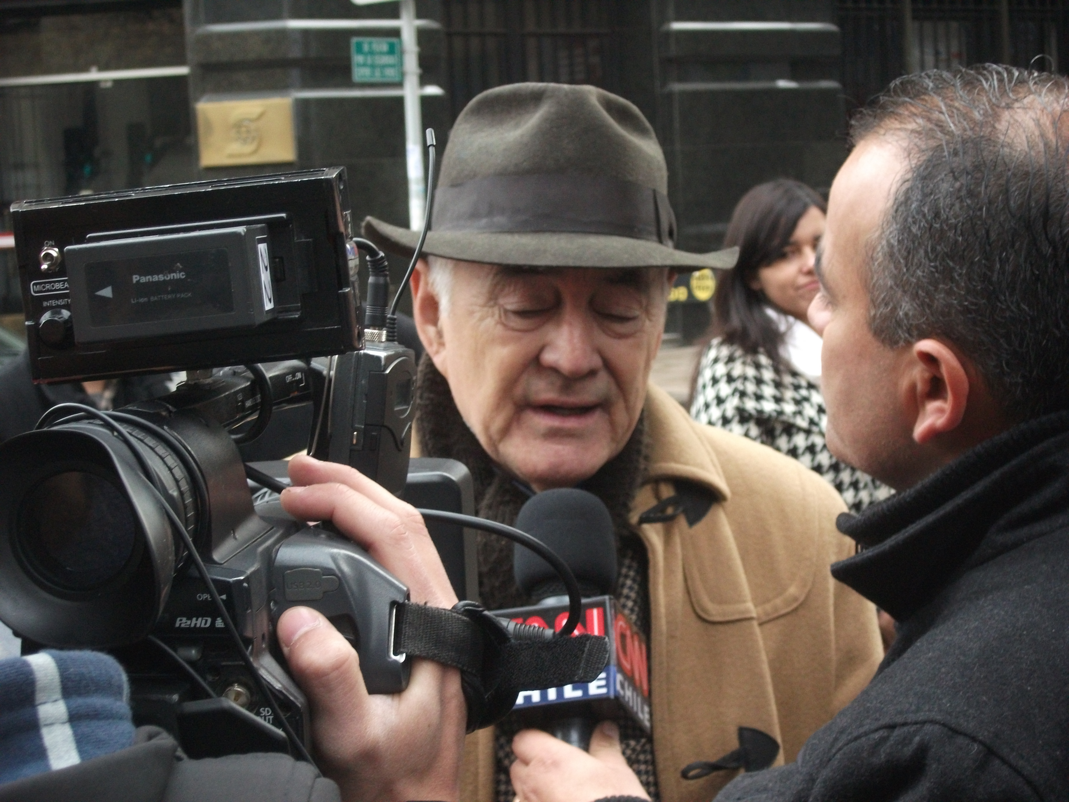 El periodista Ernesto Carmona es entrevistado el sábado 29 de Junio del año 2013, en un acto en recuerdo del asesinato del periodista-camarógrafo Leonardo Henrichsen, actividad organizada por la Municipalidad de Santiago de Chile.